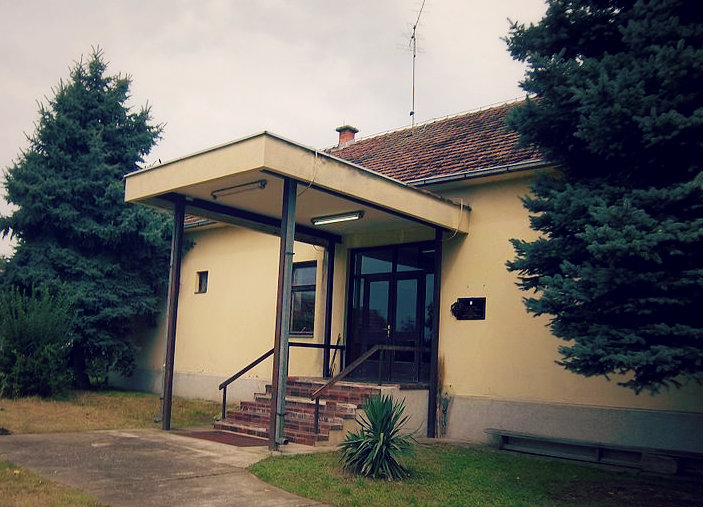 Српски (ћирилица): Насеље Пачетин у Општини Трпиња у источној Хрватској.